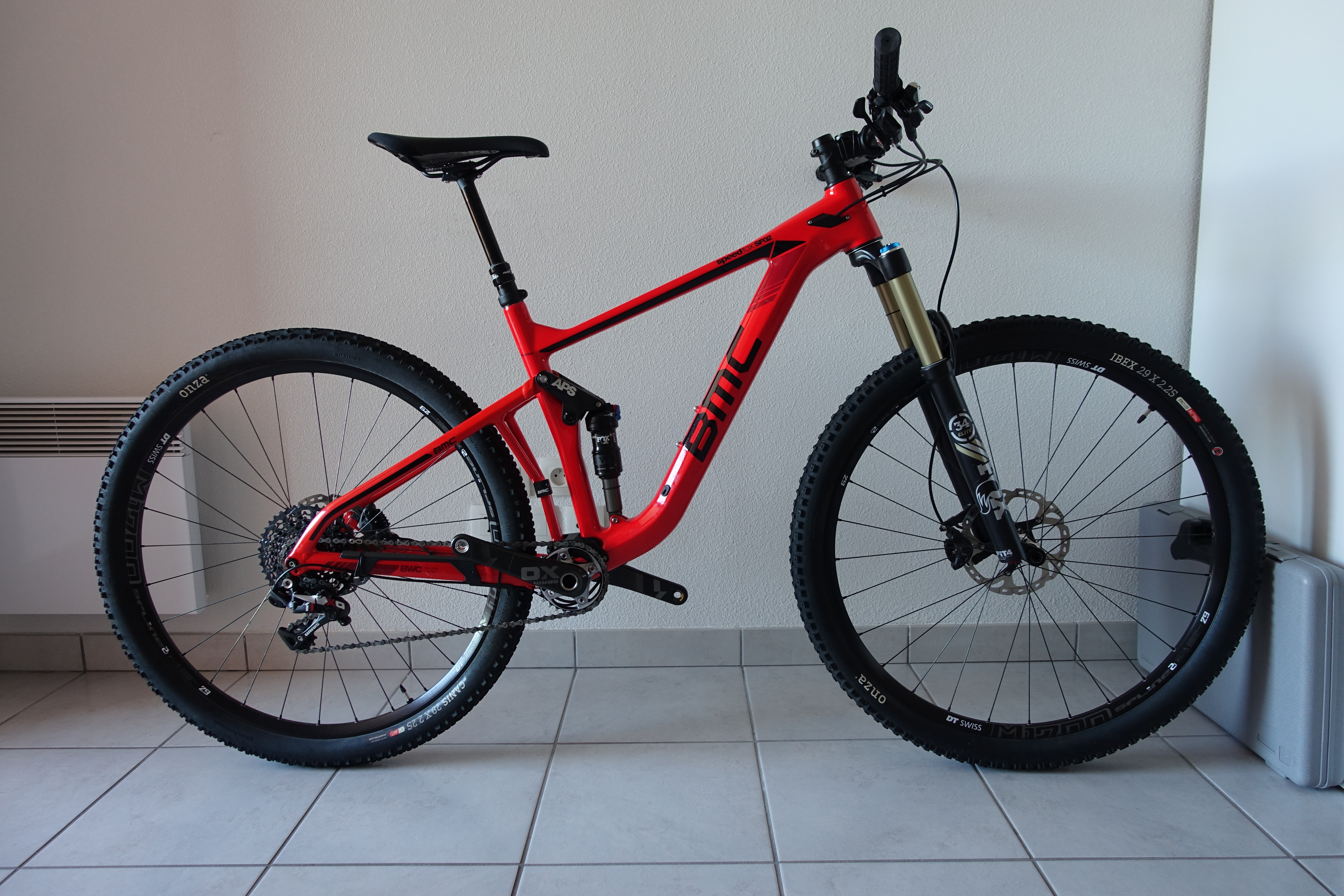 BMC Speedfox SF02 2016. VTT de trail 29 pouces de BMC